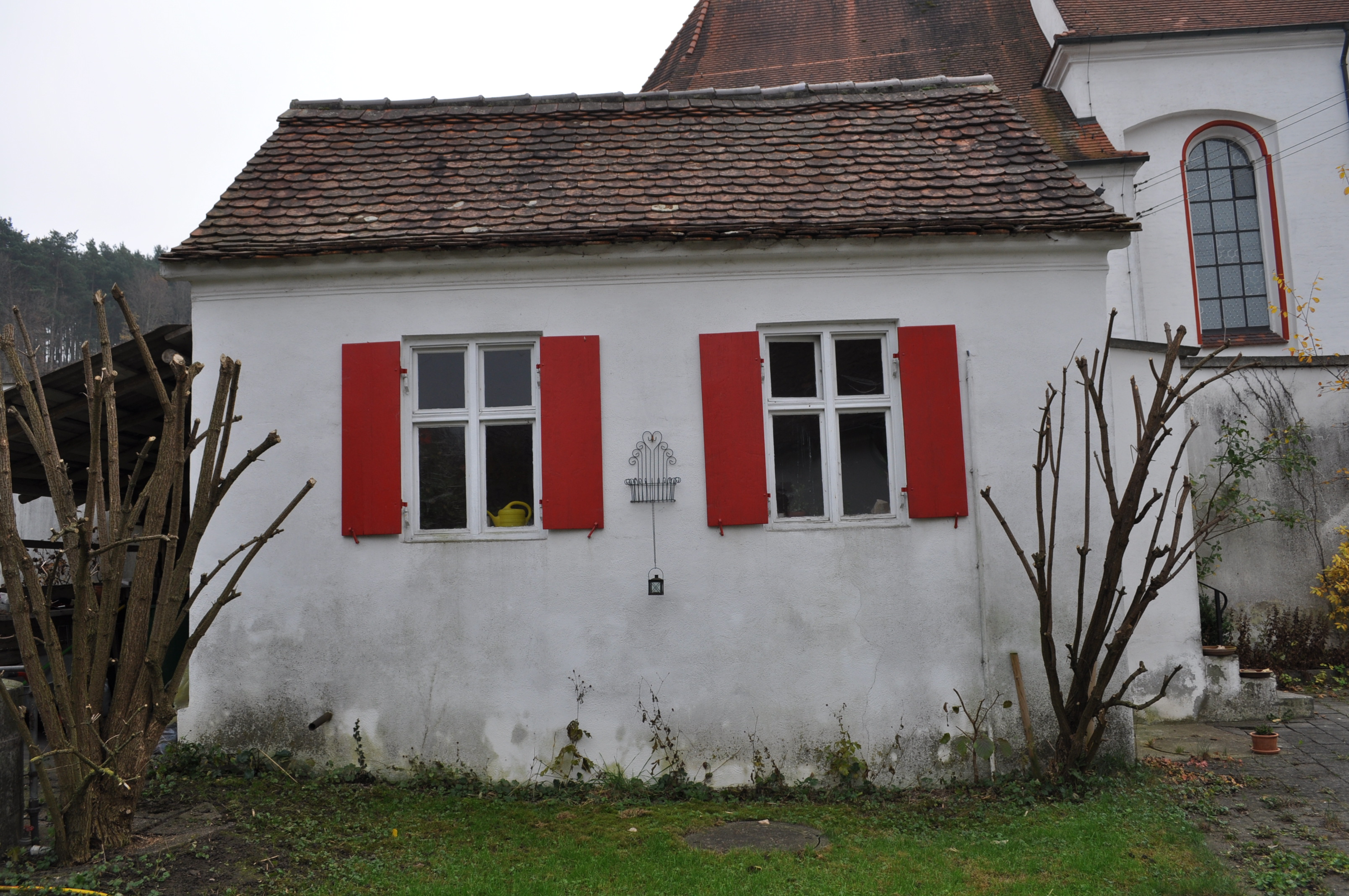 Haus in Aislingen